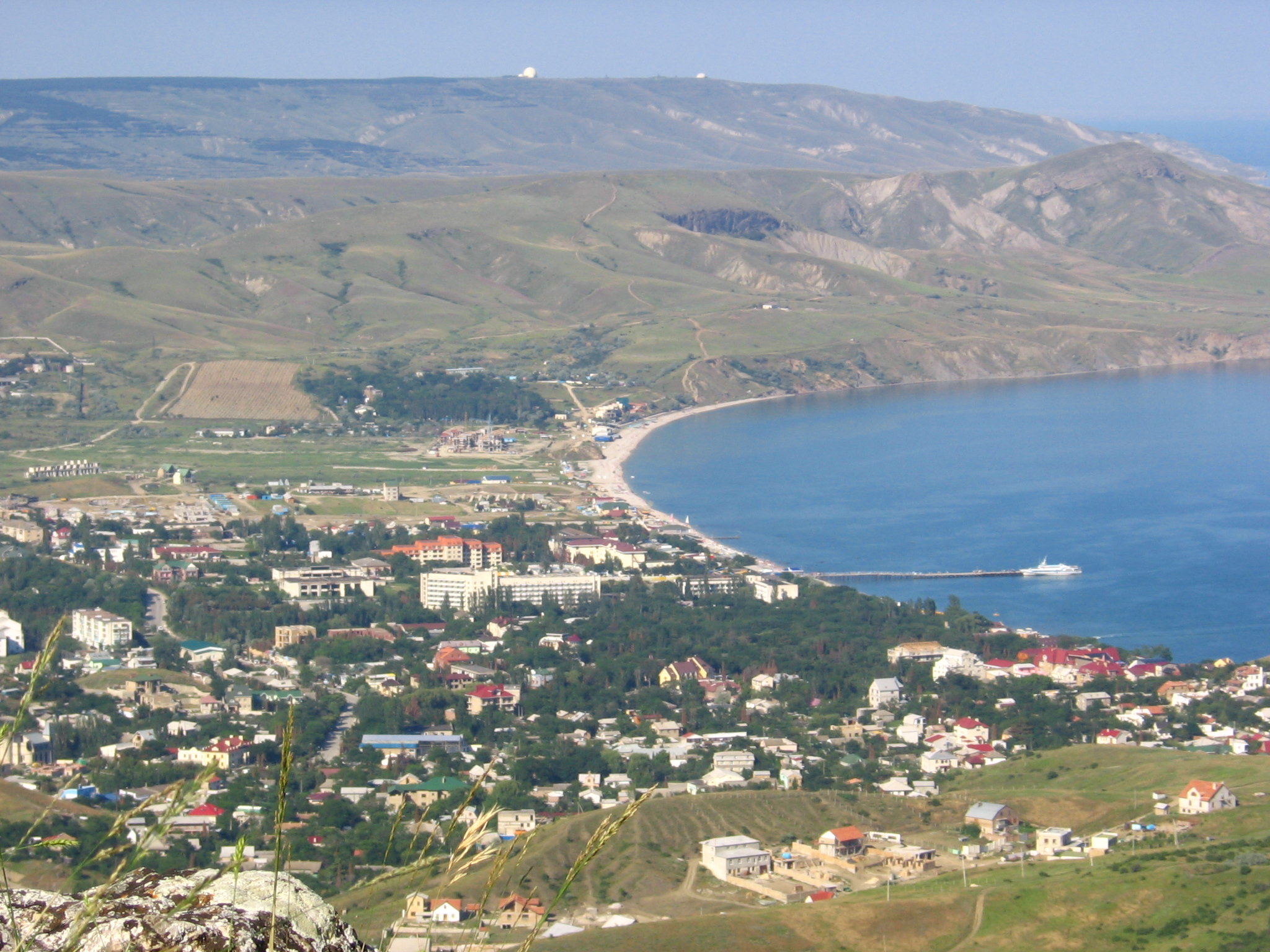 Koktebel